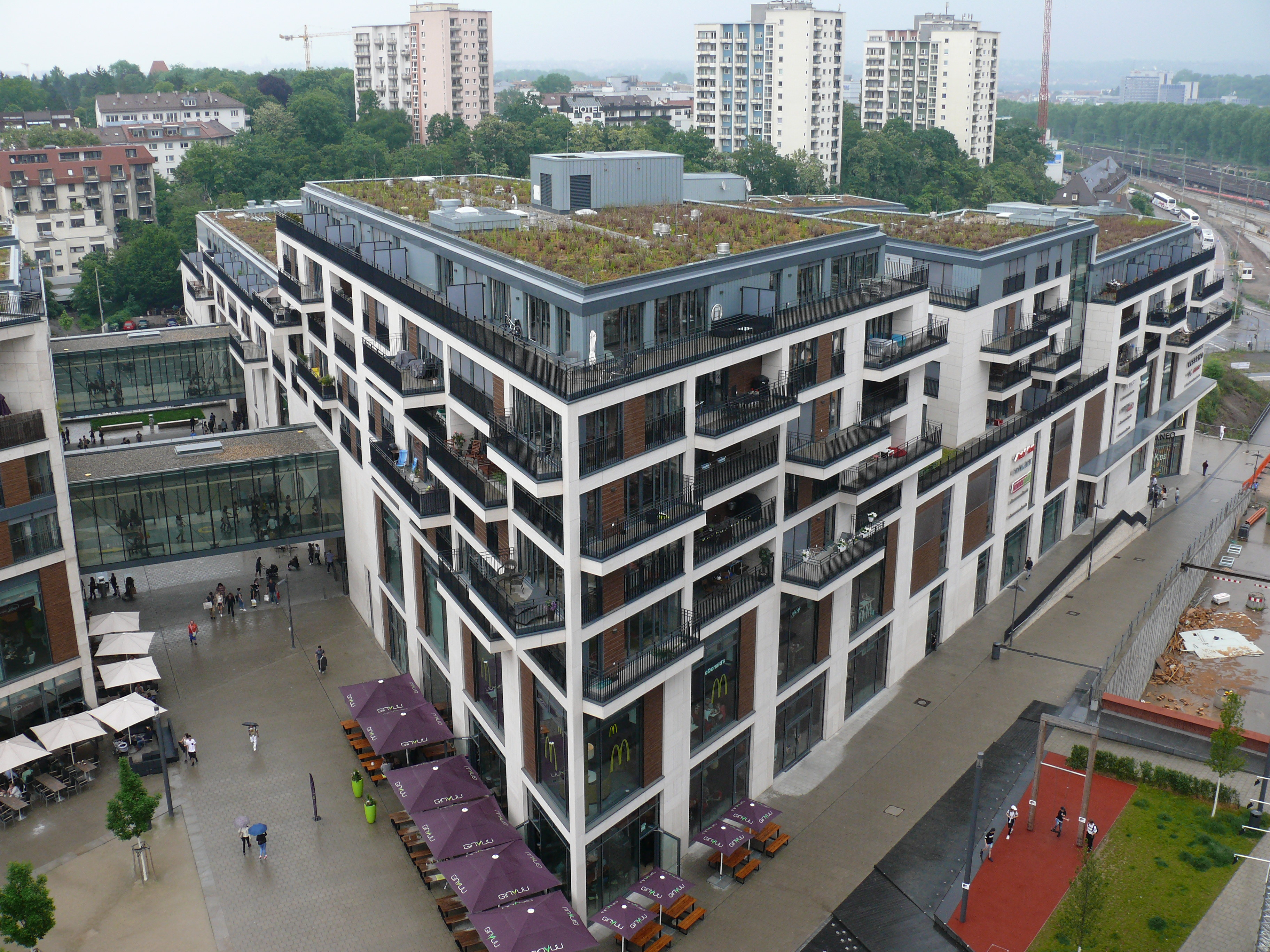 Blick von der Stadtbibliothek auf den südlichen Gebäudeteil des Einkaufszentrums Milaneo in Stuttgart.